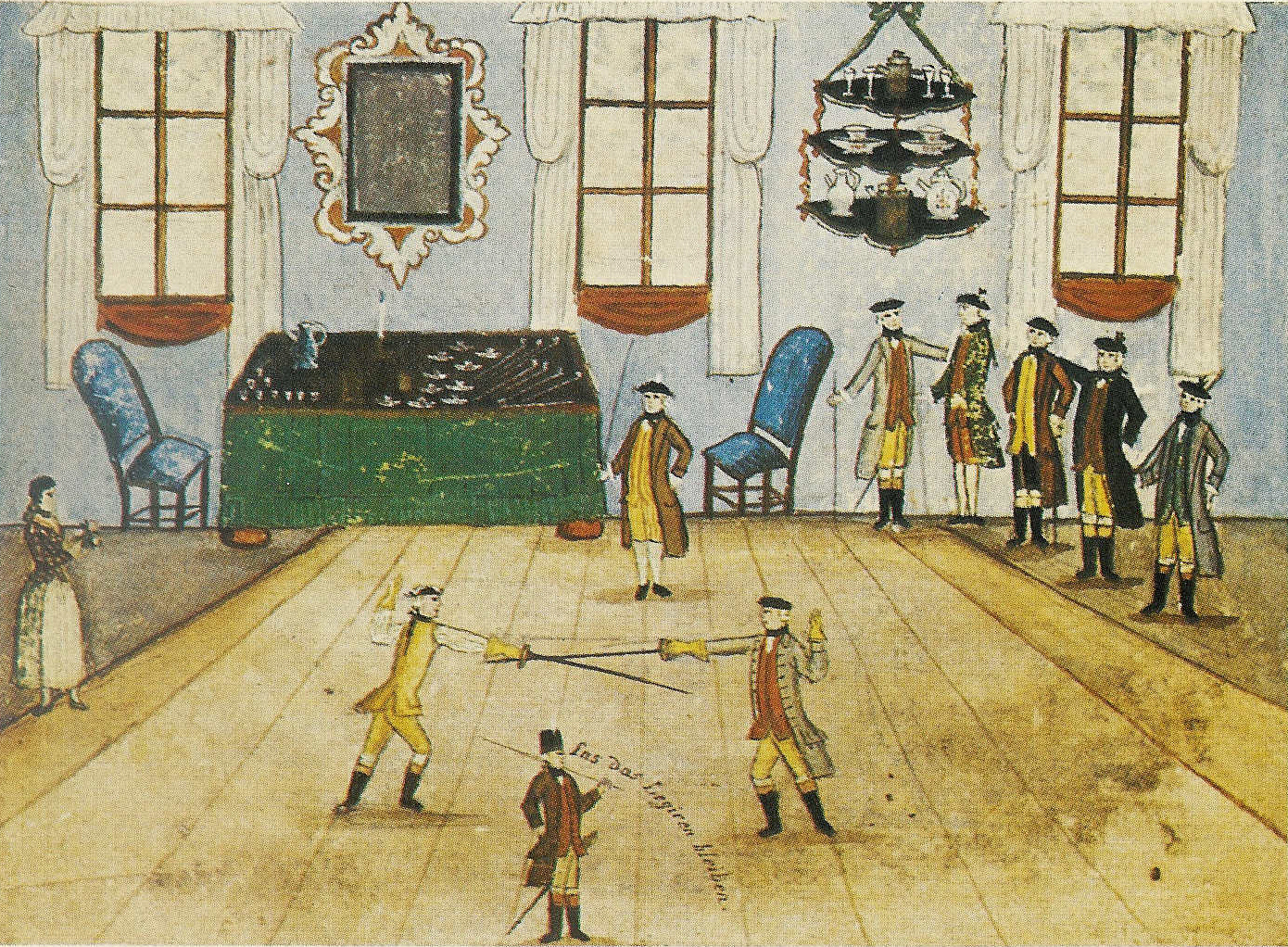 Fechtübungen Göttinger Studenten in einer Wohnung, aus: Stammbuch Hempel 1773 (Stadtarchiv Göttingen) In der Abbildung gibt der Fechtmeister die Anweisung: Las das Legiren bleiben. Zum Legieren oder Ligieren siehe den Wikipedia-Artikel Ligade! Fencing training of Göttingen students in an appartment, Stammbuch Hempel 1773, Göttingen Municipal Archive